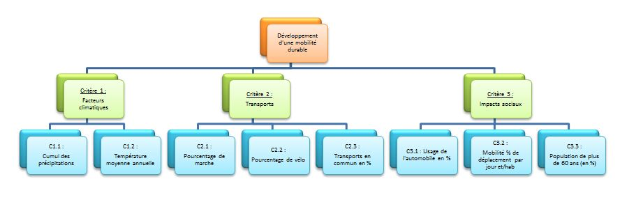 Décomposition des critères d'appréciation d'une ville